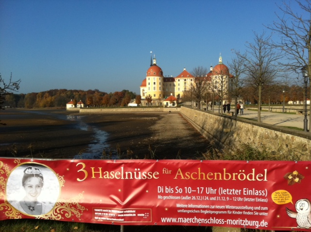 Das Banner am Eingang vom Schloss Moritzburg lädt zu Ausstellung 3 Haselnüsse für Aschenbrödel ab 05.11.2011 ein